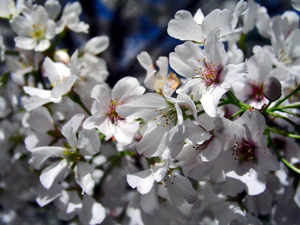 Sakura